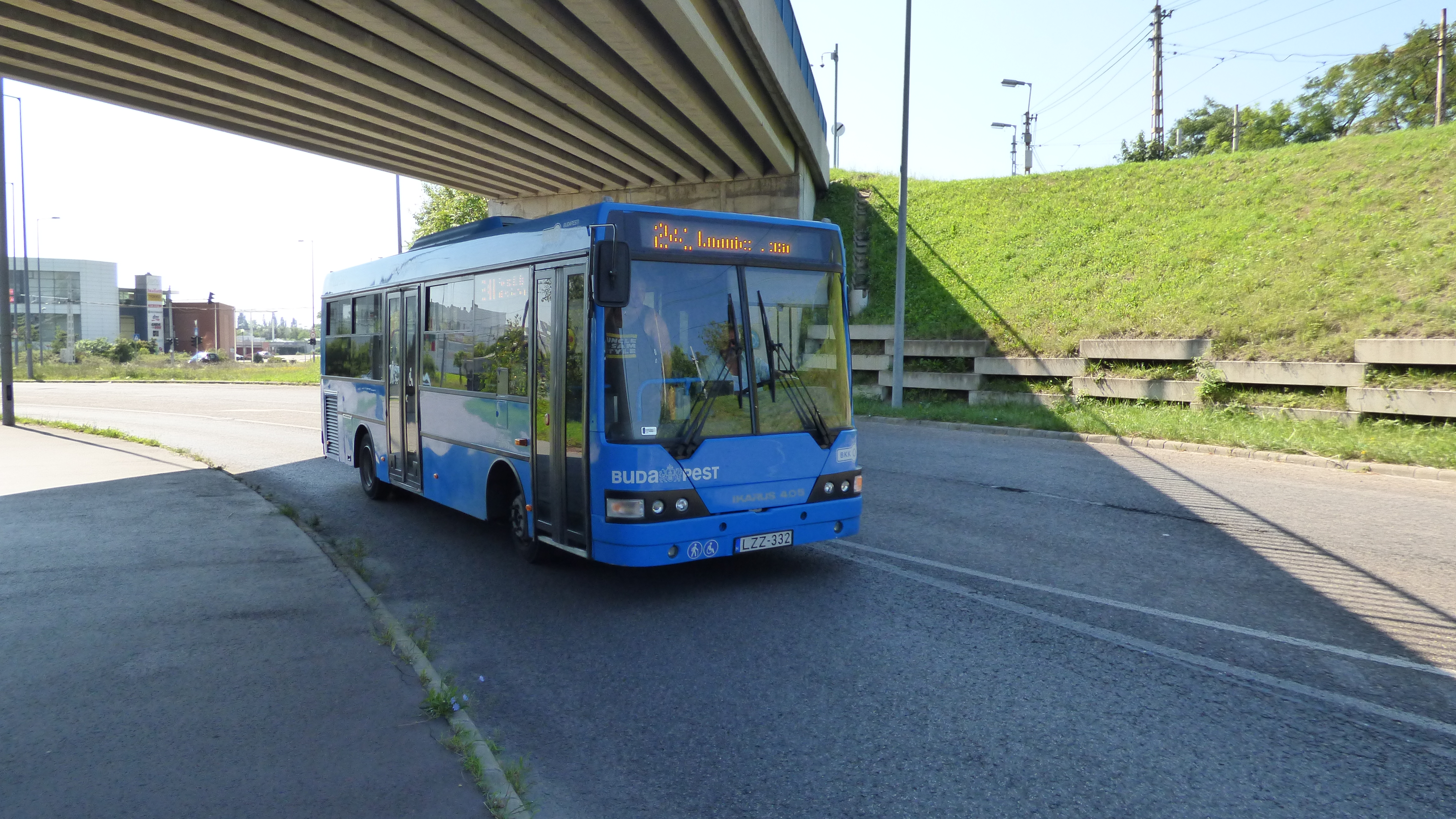 241-es jelzésű Ikarus 405-ös busz a Savoya Parknál (frsz. LZZ-332)